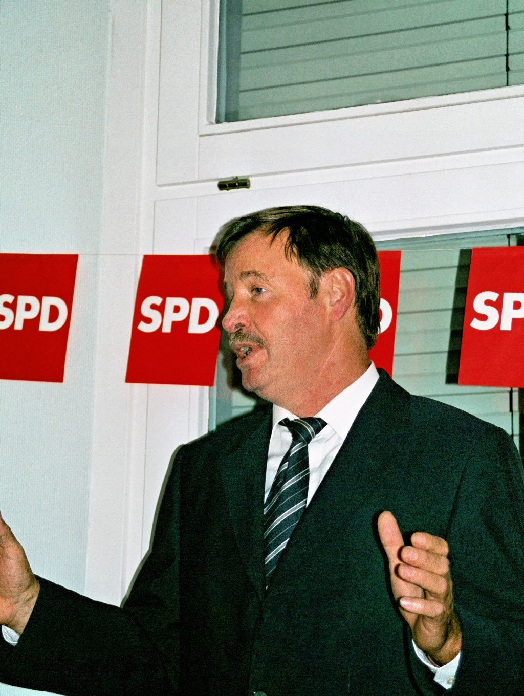 Ortwin Runde bei einer Wahlparty in Hamburg.